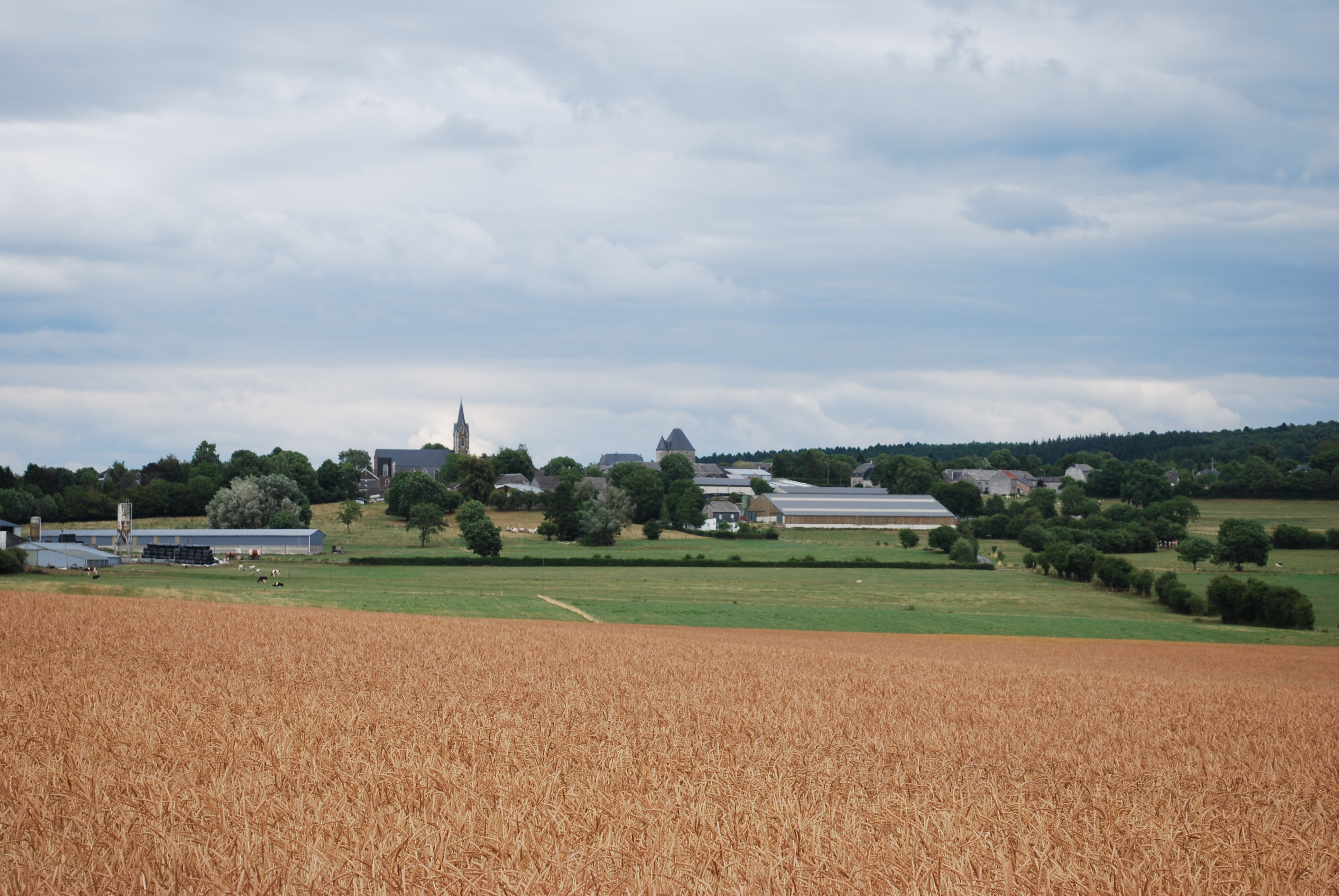 Vue générale d'Izier, depuis Ozo (Durbuy).